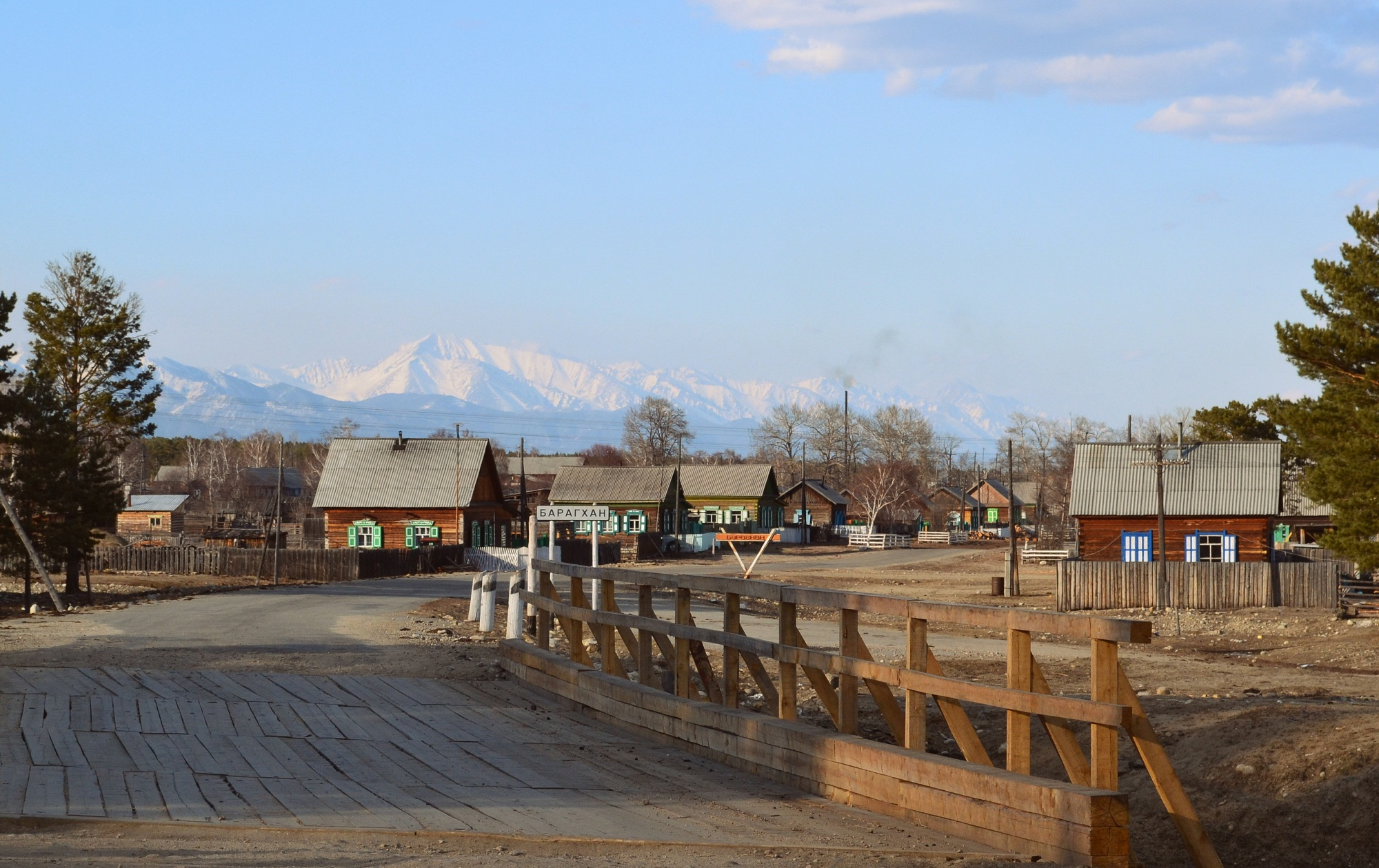 Село Барагхан. Курумканский район, Бурятия.